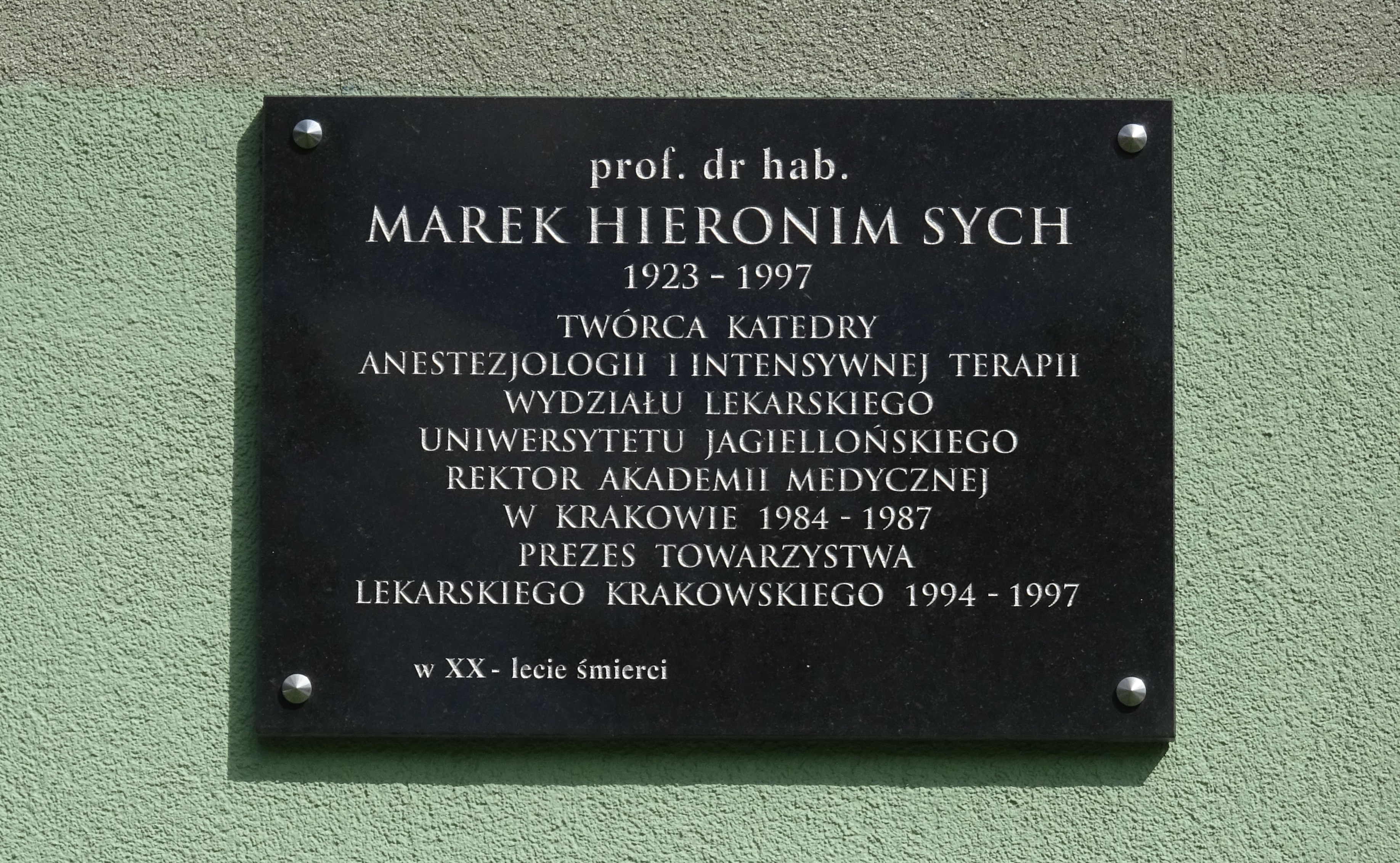 Osiedle Strusia 2, Ulica Marka Sycha - tablica upamiętniająca Marka Hieronima Sycha wmurowana w elewację budynku przy ulicy nazwanej jego imieniem na Osiedlu Strusia, w Bieńczycach w 20. rocznicę śmierci, w 2017 roku. Kraków, 2019.